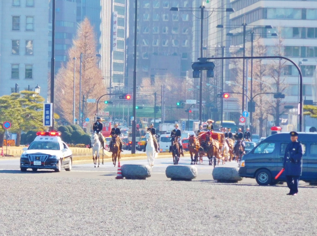 Paul Damian Madden 駐日英国大使信任状捧呈式